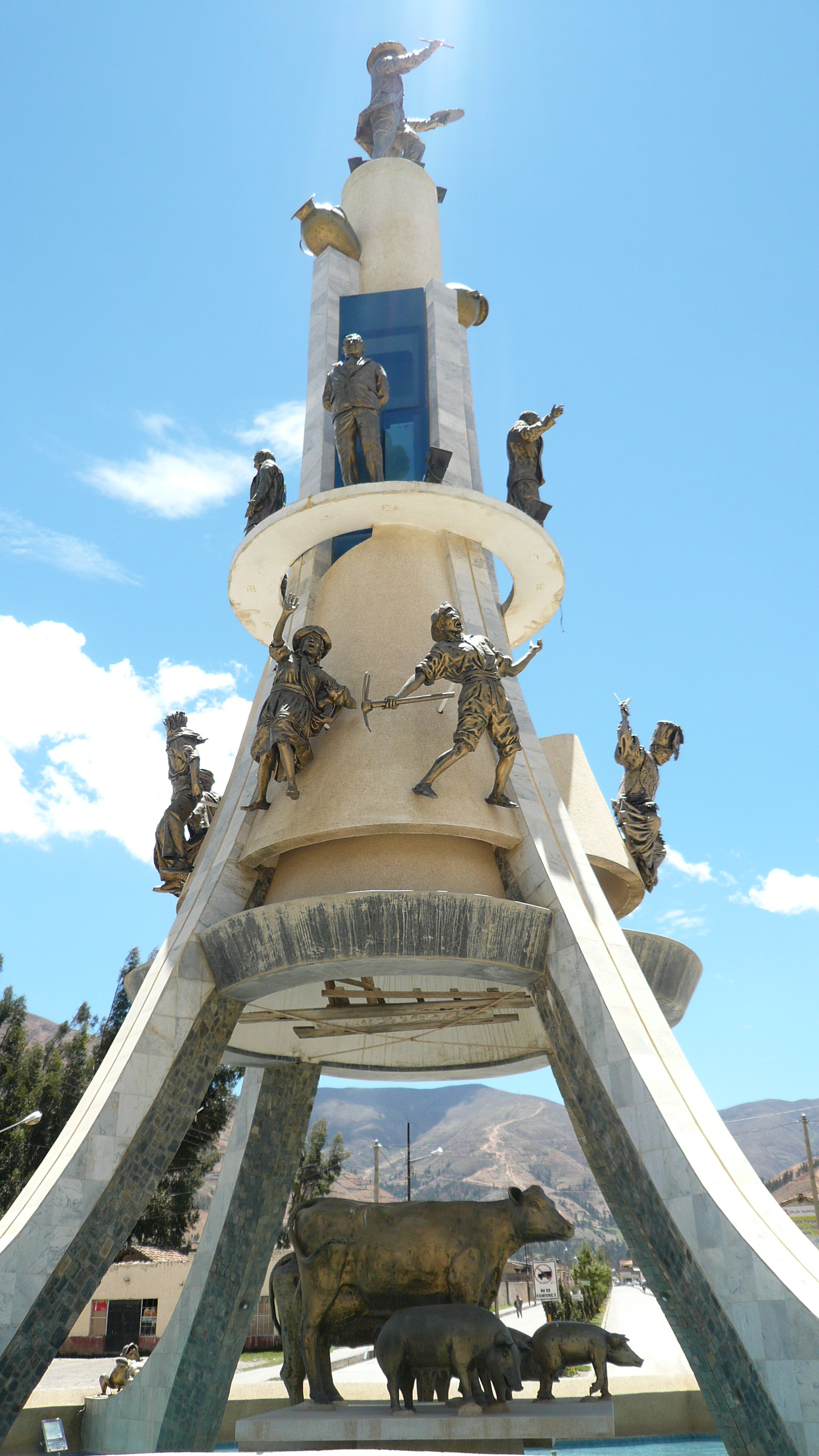 Óvalo de Pampas, ubicado a la entrada de esta ciudad.